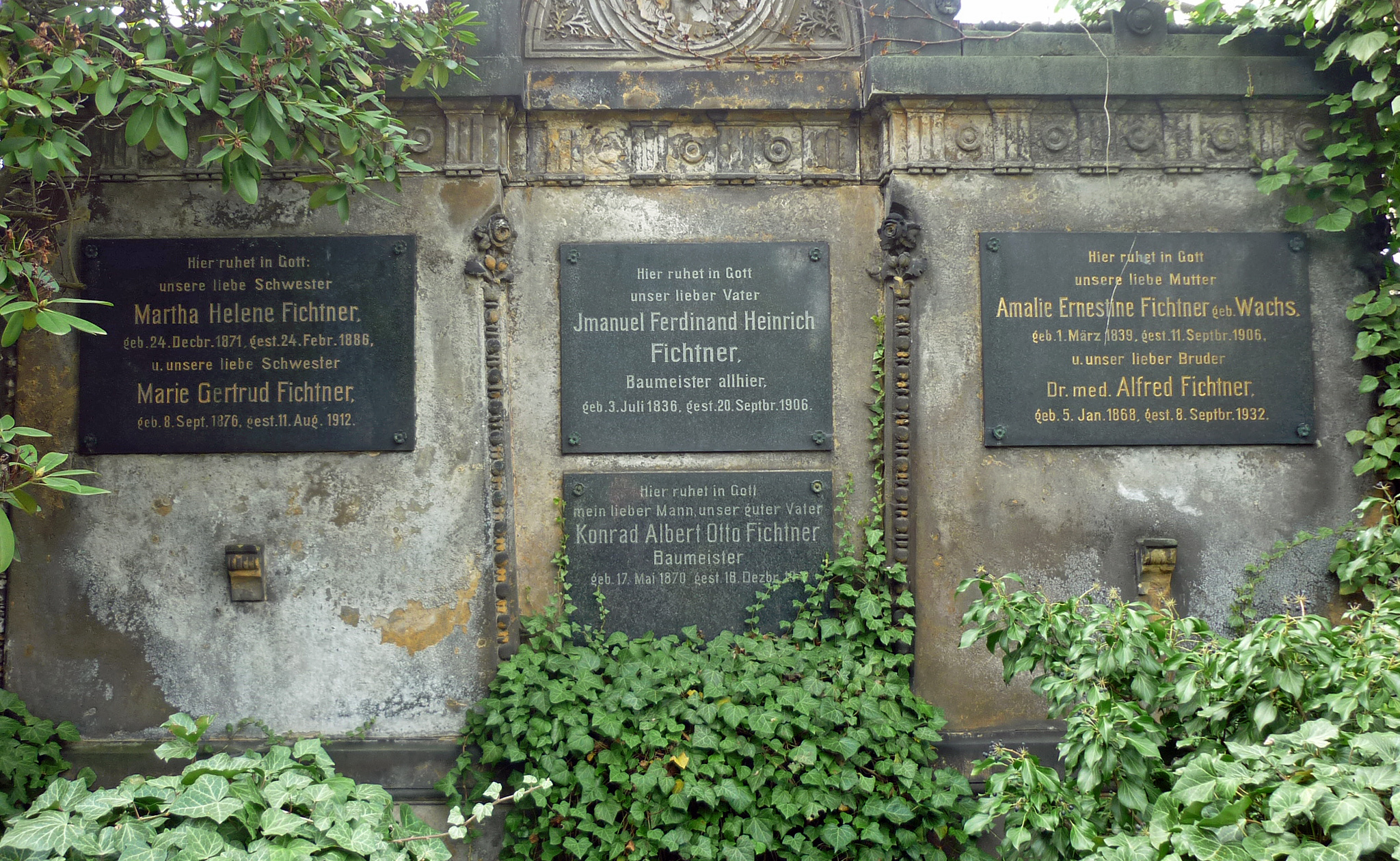 Grabstätte der Familie Fichtner auf dem Inneren Plauenschen Friedhof in Dresden-Plauen, Altplauen 5